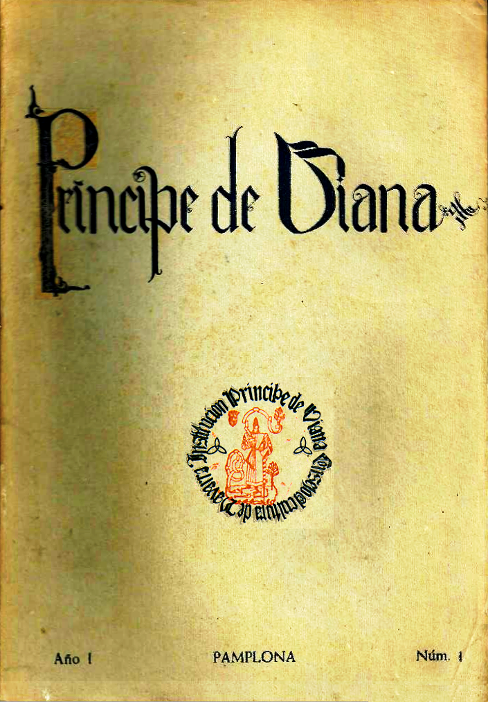 Portada Revista Príncipe de Viana año I num1 (1940)